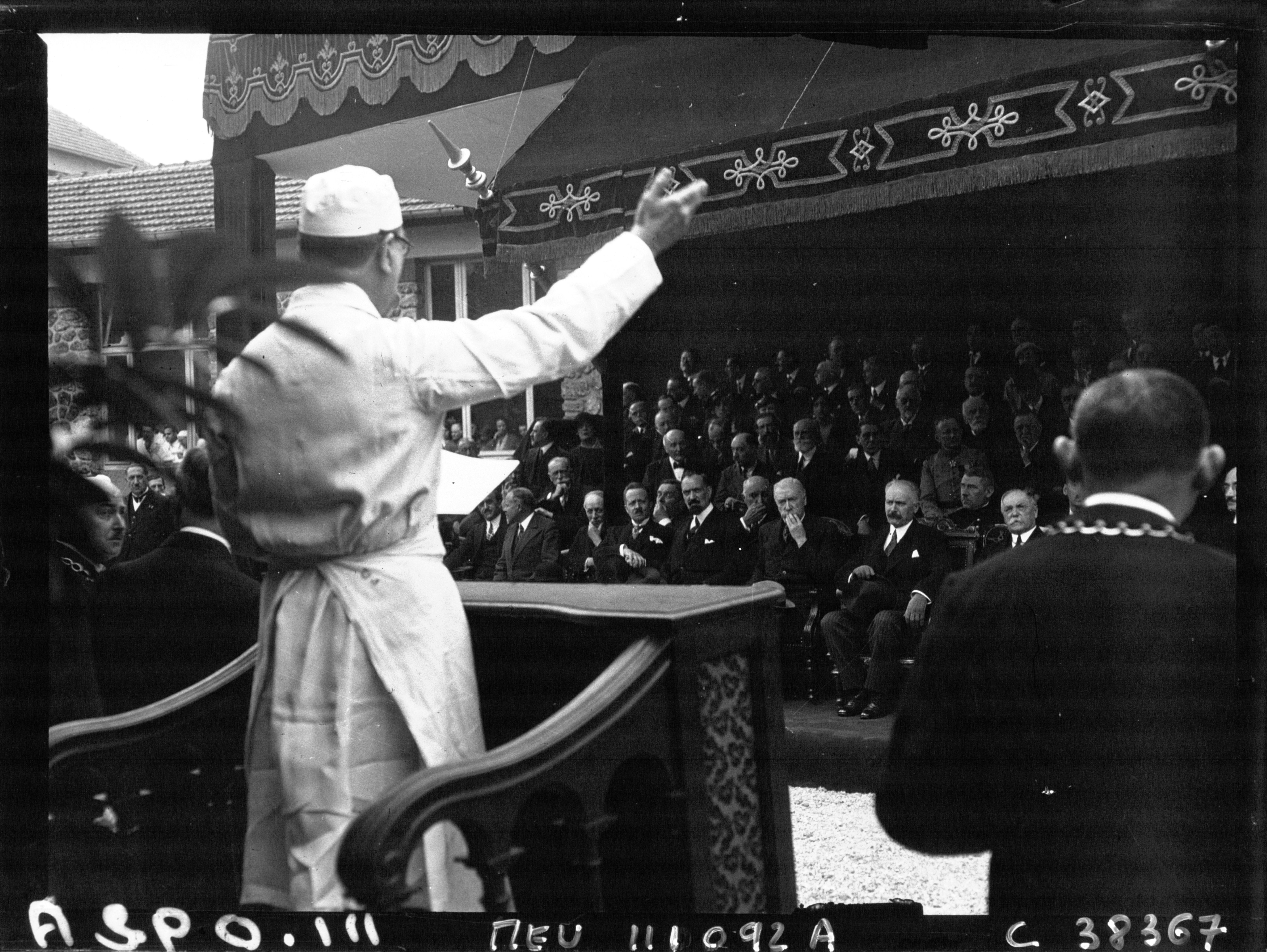 Inauguration de l'Institut du Cancer à Villejuif : le discours du Docteur Roussy (photographie de presse)